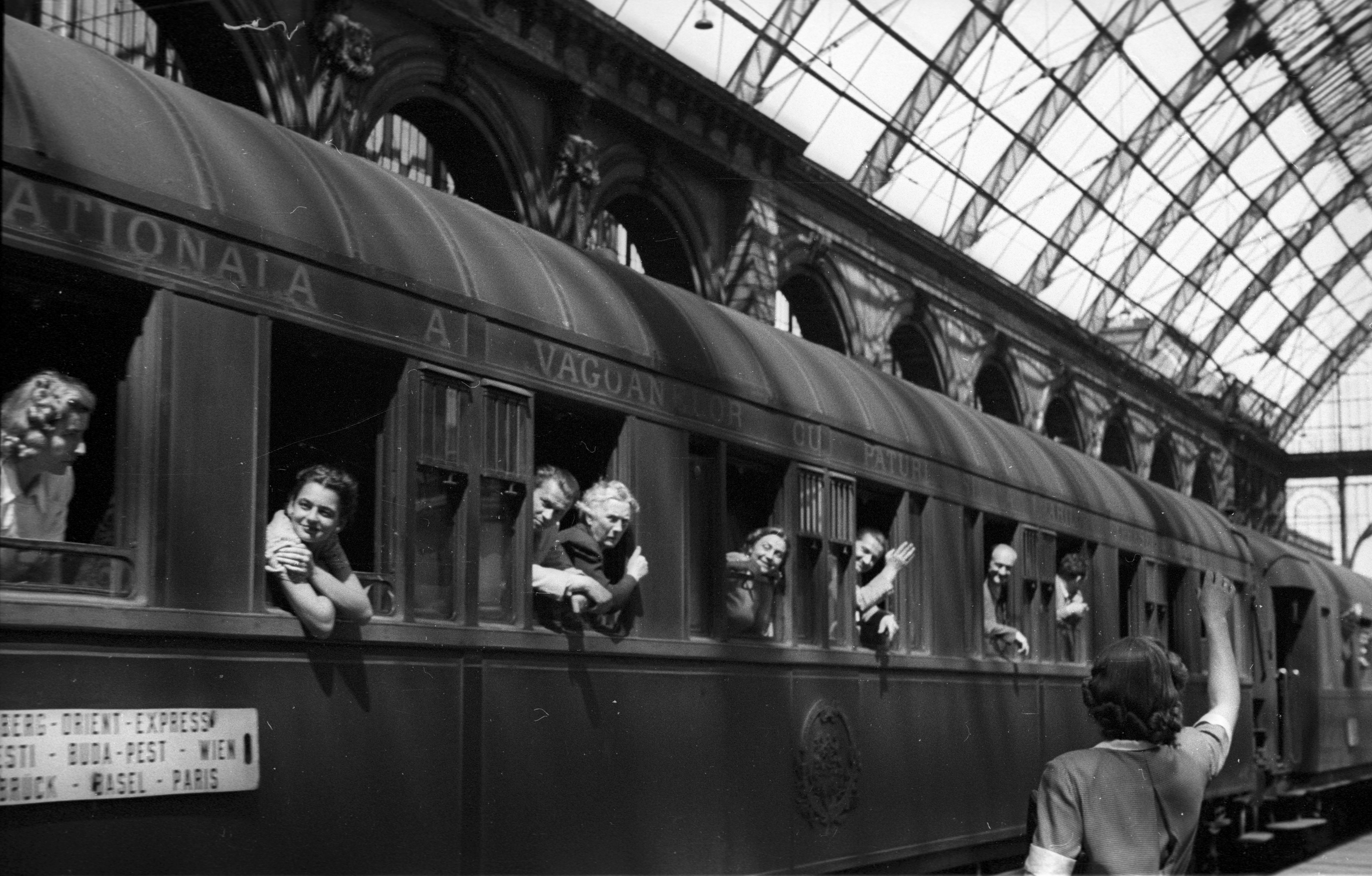 Keleti pályaudvar, Alberg Orient Expressz. Location: Hungary, Budapest VIII. Tags: Budapest Title: Keleti pályaudvar, Alberg Orient Expressz.